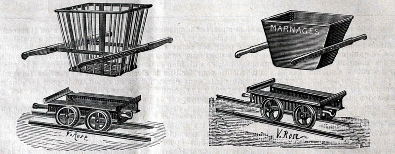 Victor Rose - Decauville wagon porteur (Decauville catalogue 1897-1900)